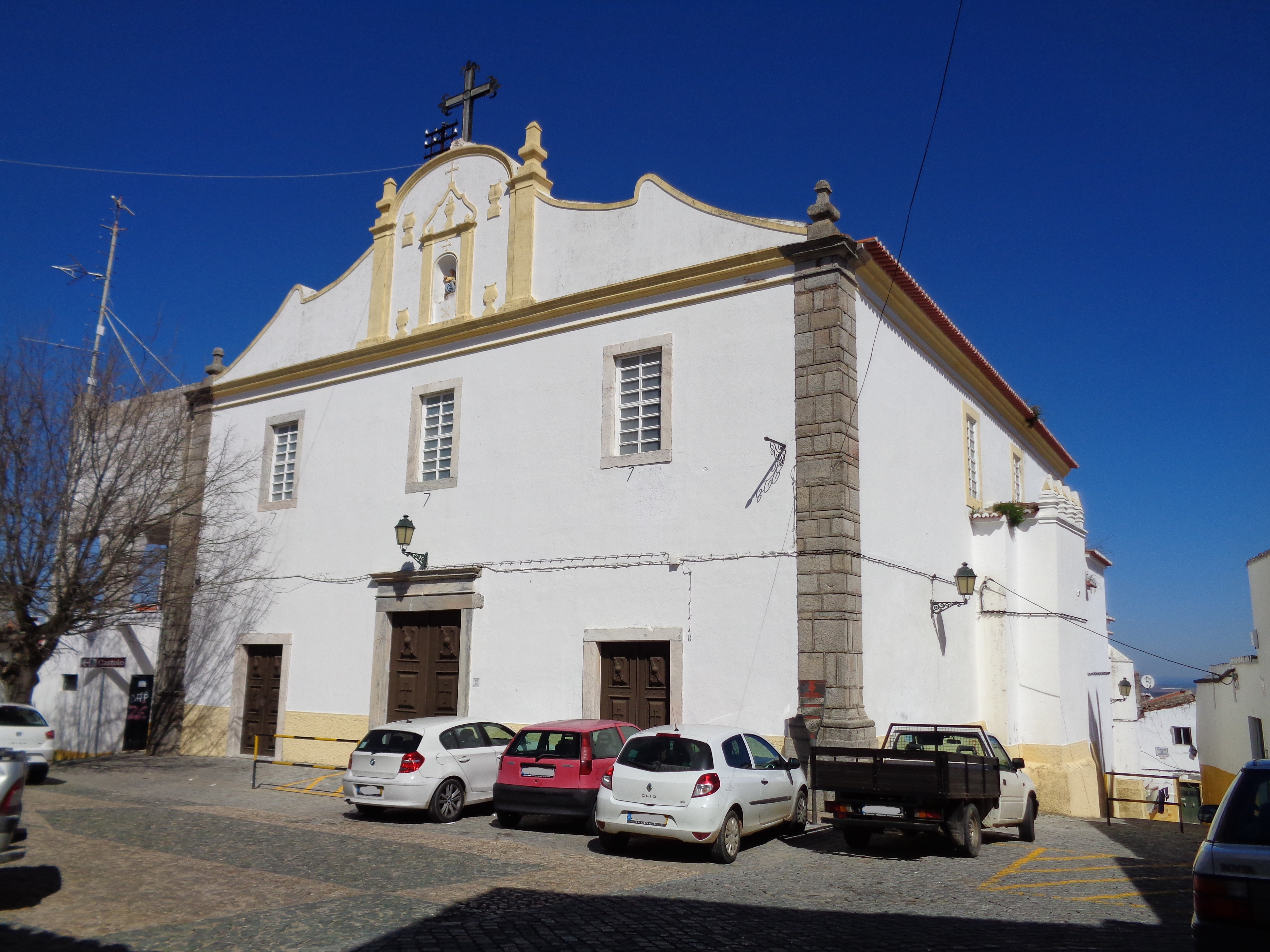 Igreja da Alcáçova em Elvas, Portugal